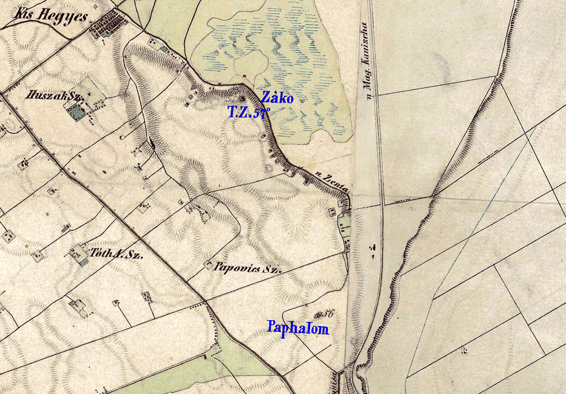 Srpski (latinica): Humke Pap i Čako (ovde pogrešno upisana sa "Zako") prikazane na mapi II. vojnog premera, BAC394/BAC393